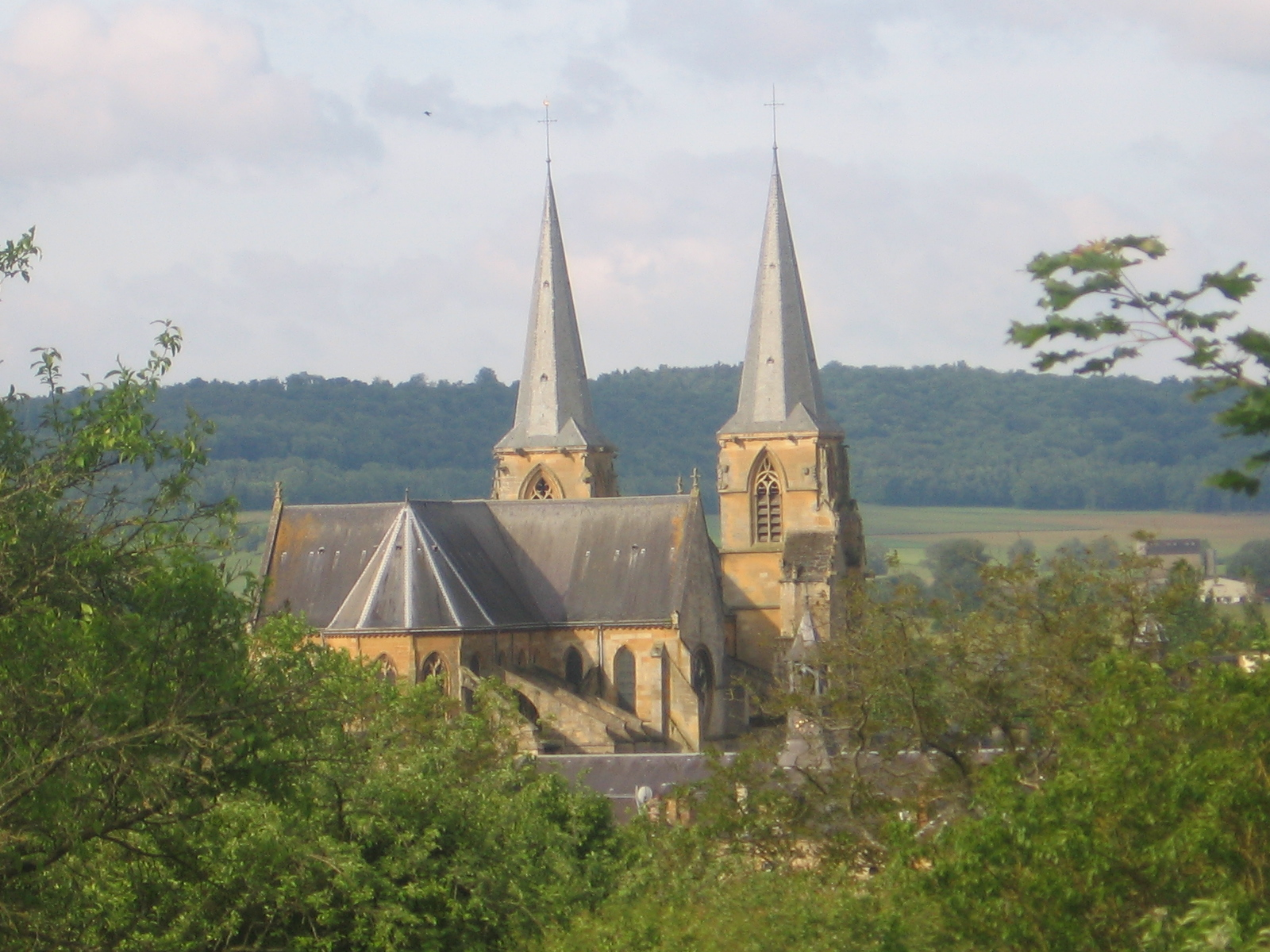 Mouzon